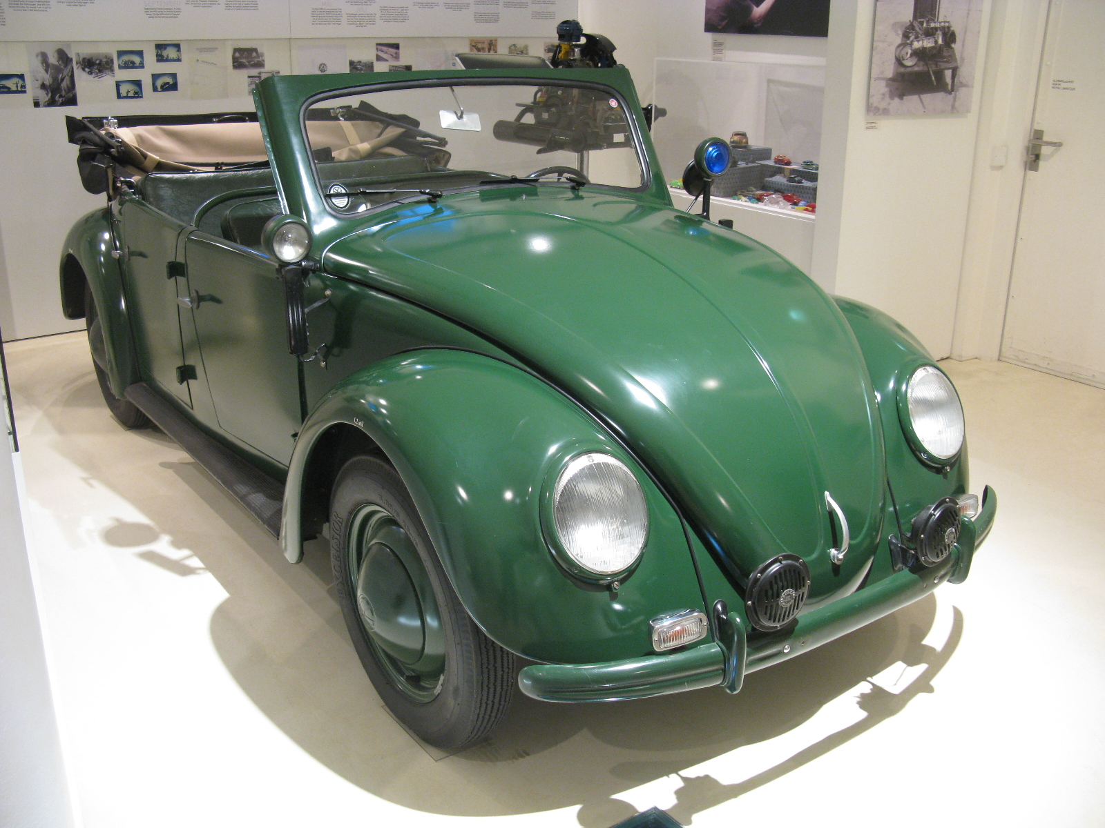 Volkswagen Papler Polizei Käfer 1951